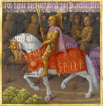 Antiquités judaïques, Flavius Josèphe, traduction anonyme, vers 1470, Nouvelle acquisition française 21013, f191 Vespasien marchant contre les Juifs